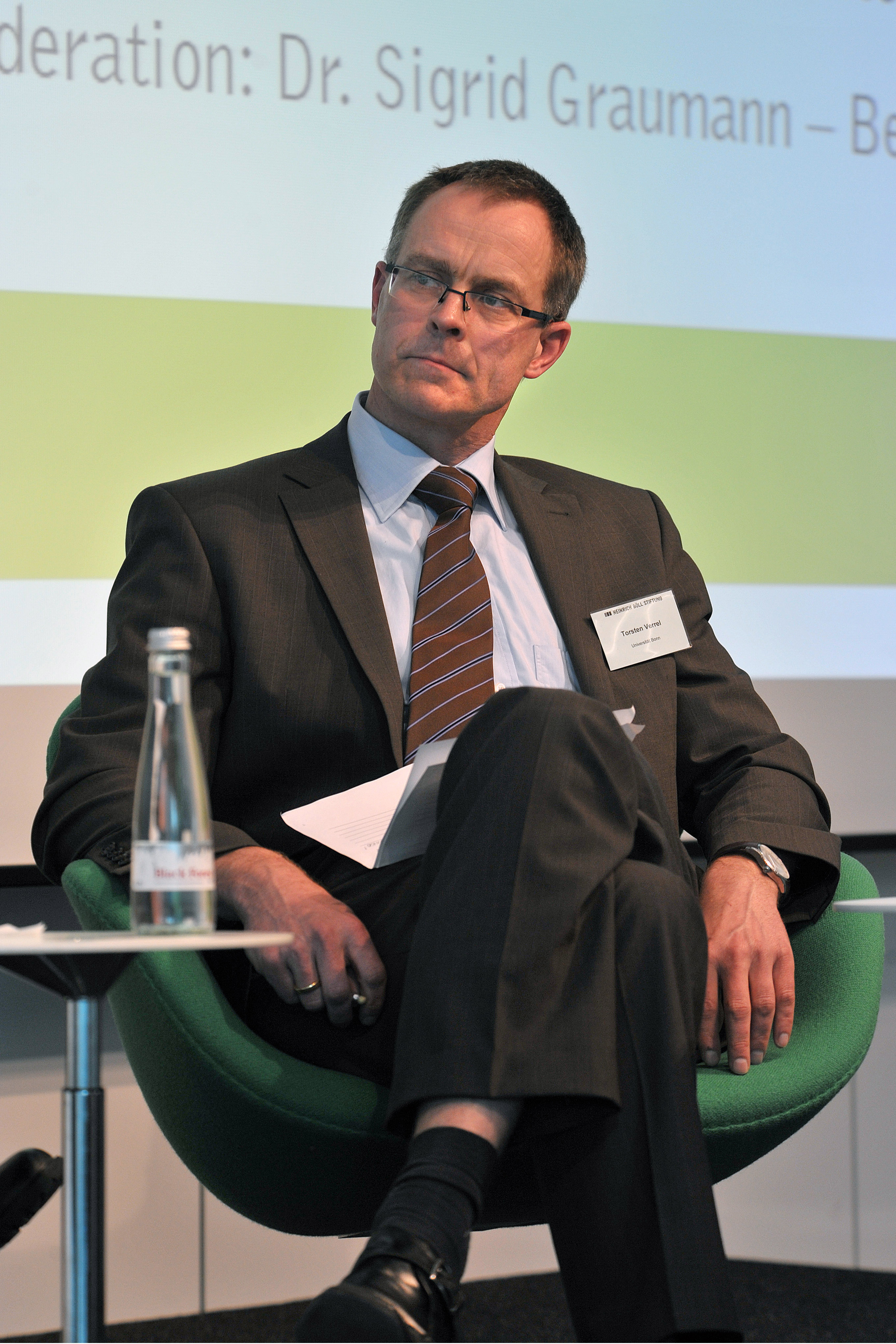 Prof. Dr. Torsten Verrel, Universität Bonn, Kriminologisches Seminar Foto: Heinrich-Böll-Stiftung/xpress